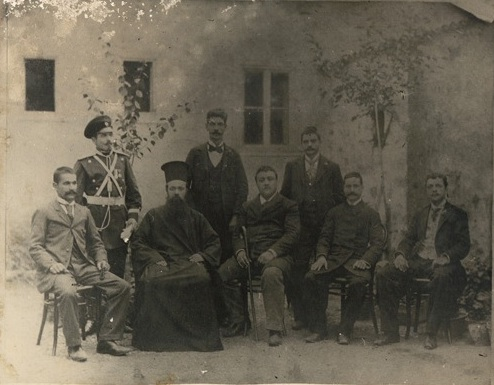 Райчо А. Ковачев, Д. Юруков - гавазин, свещеник Дойчин Запрев - архиерейски наместник, Ил. А. Ковачев, Дико Йовев - заместник на българския търговски агент, Д. Гоголов, Д. Чипанов и Ат. Маринов.